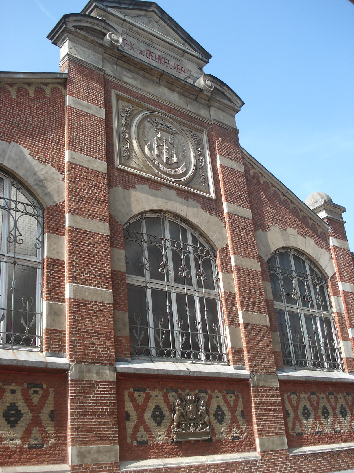 Antwerpen, gebouw van distilleerderij François-Xavier de Beukelaer aan de Haantjeslei, n.o.v. archit. Jules Hofman.